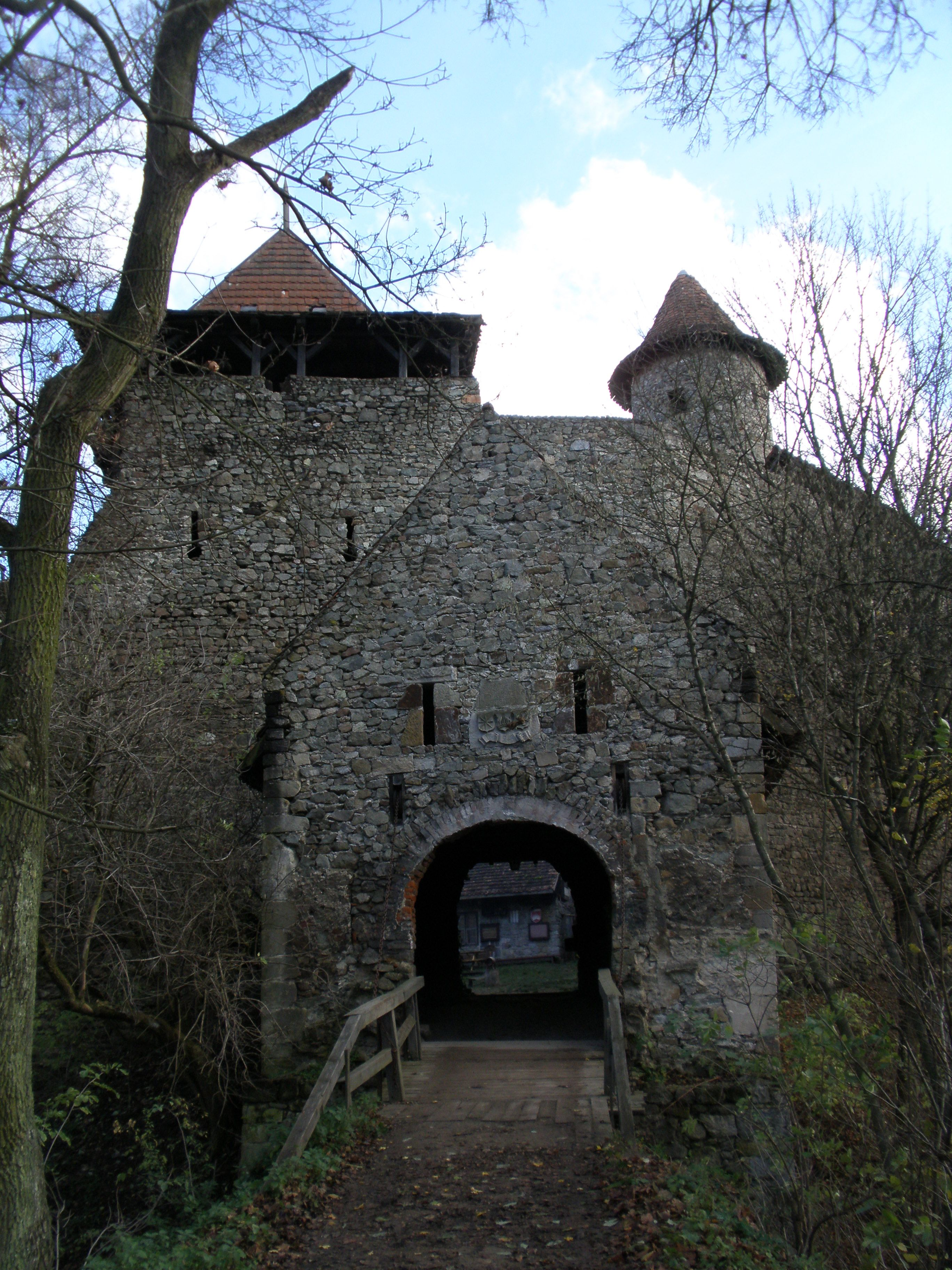 Vstupní portál do Nového hradu